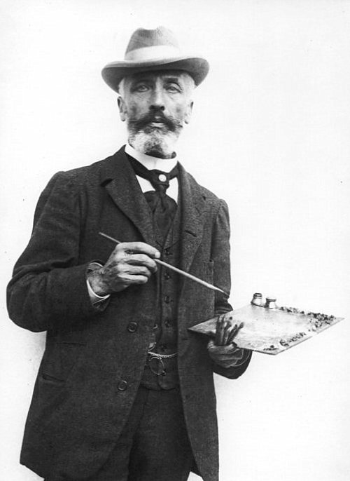 Photographie de Jules Aviat